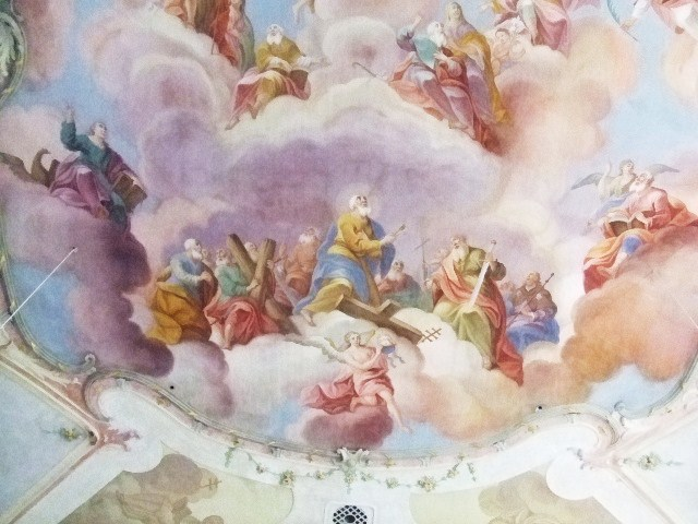 Pfarrkirche St. Sebastian, Untrasried, Kreis Ostallgäu Deckenfresken des kemptischen Hofmalers Linus Seif, 1775